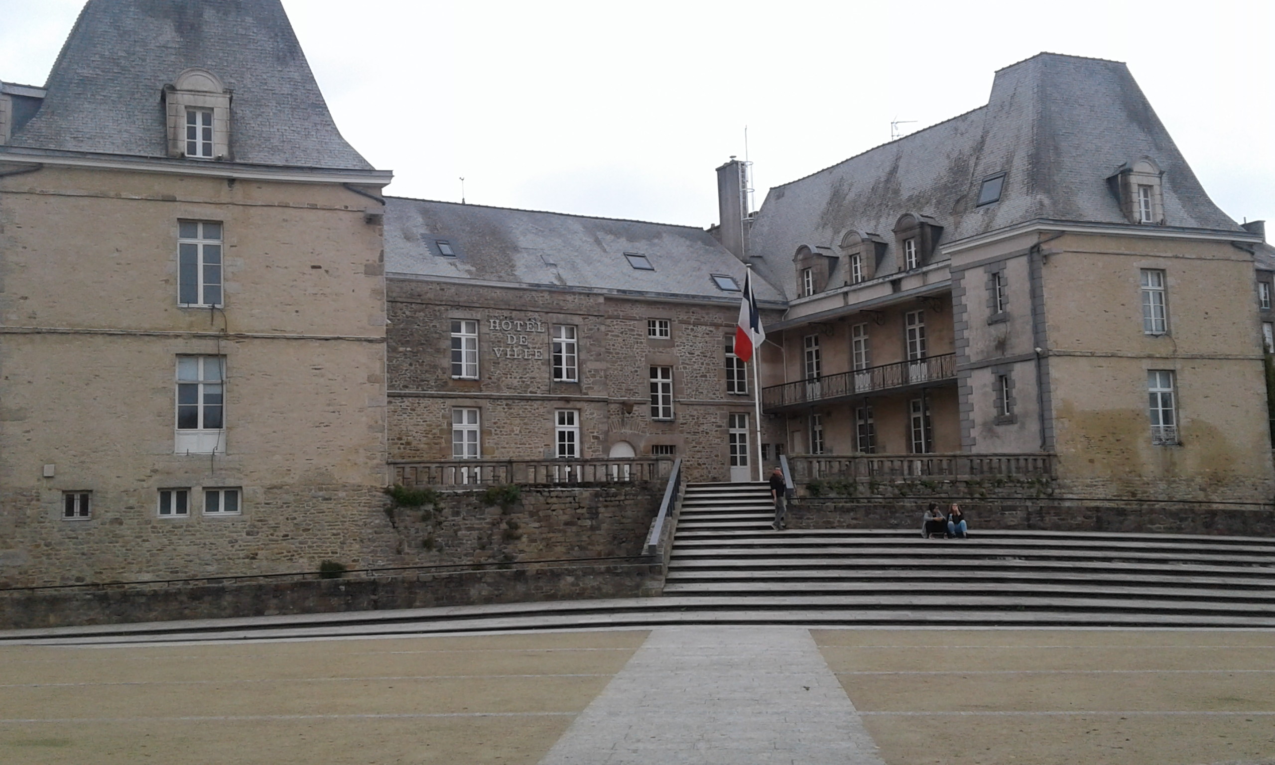 L'hotel de ville de Dinan - France